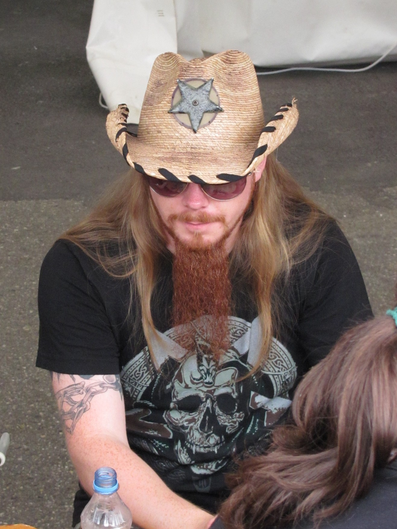 Rikard Sundén, Sabaton, Prosperita stage, Masters of Rock 2010